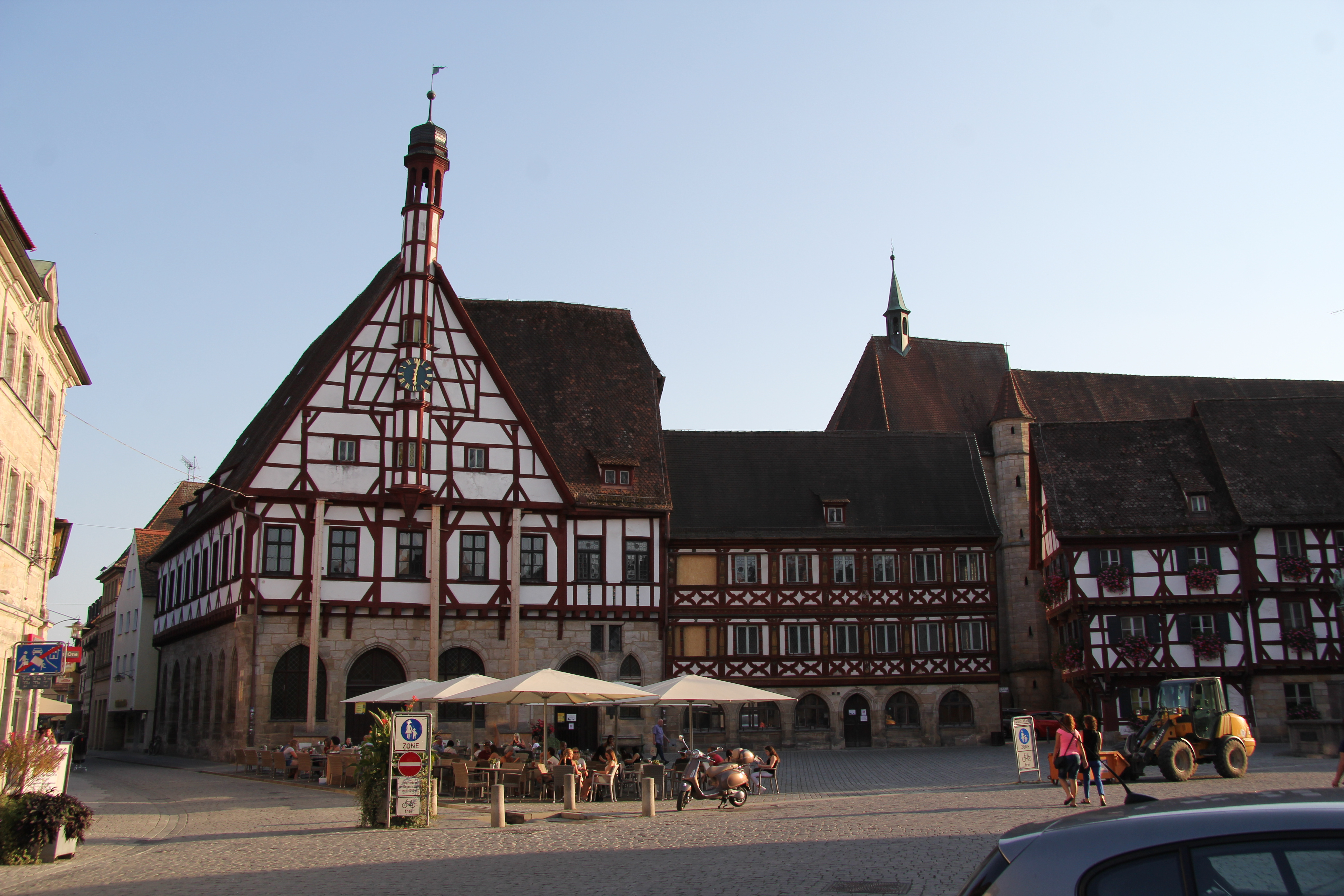 Forchheim Rathaus NordseiteThis is a photograph of an architectural monument.